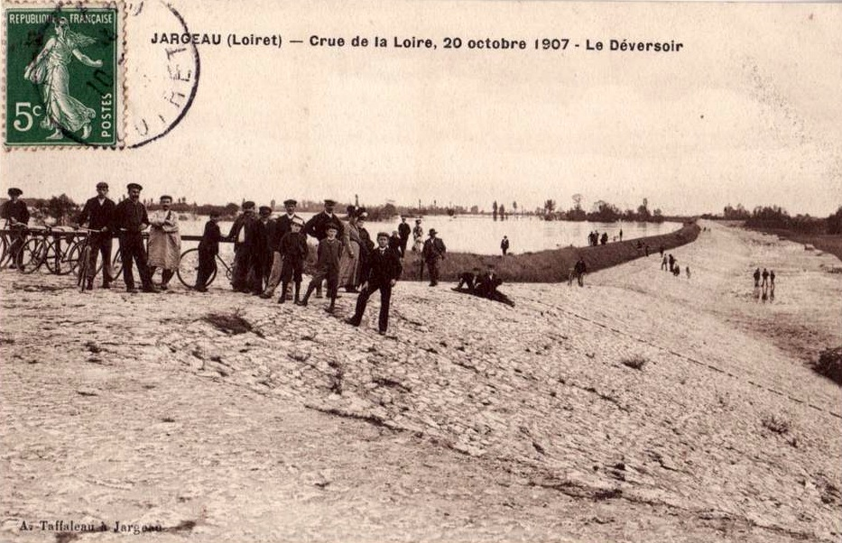 Crue de la Loire au déversoir de Jargeau (Loiret, France), le 20 octobre 1907